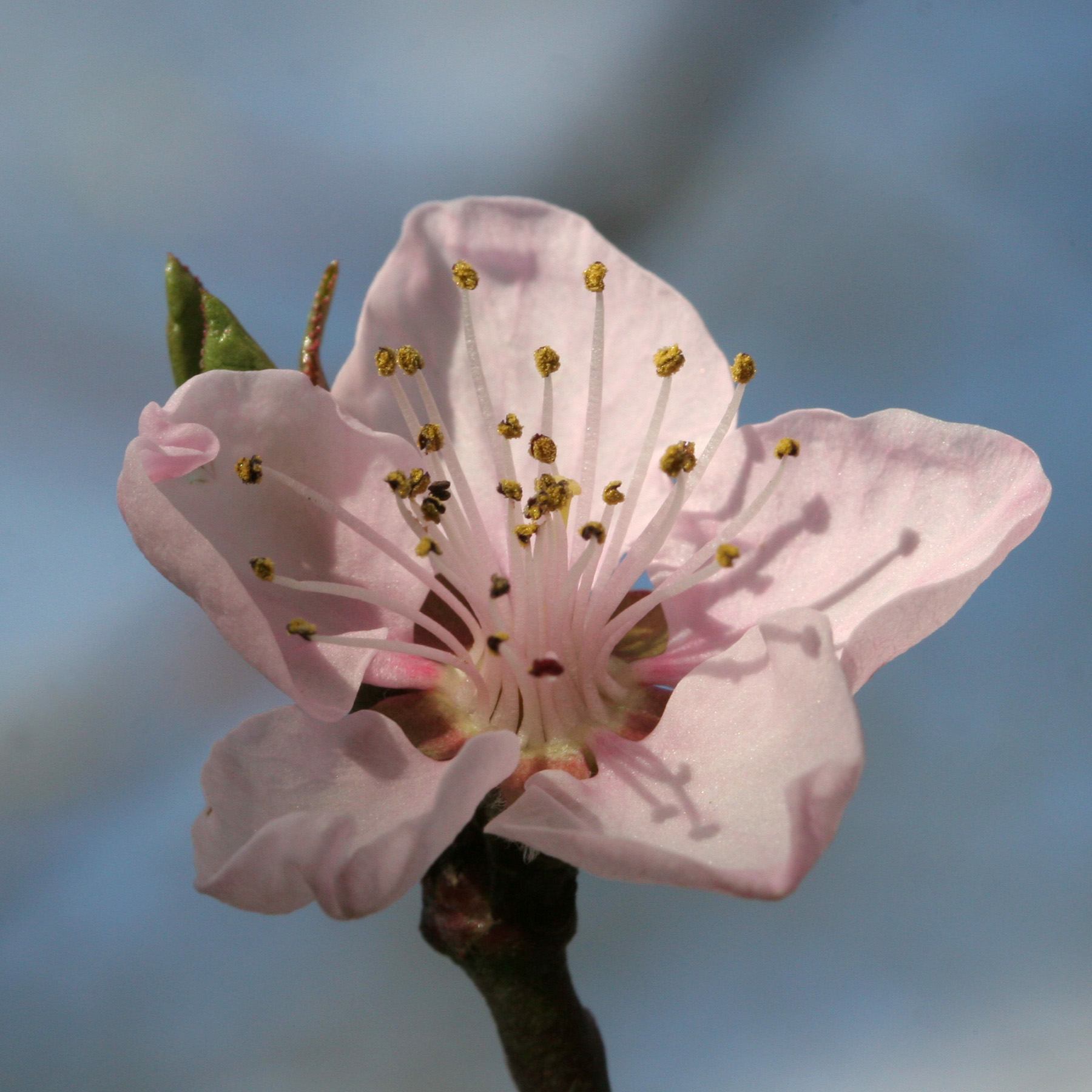 Blüte eines Pfirsichbaumes (Prunus persica).